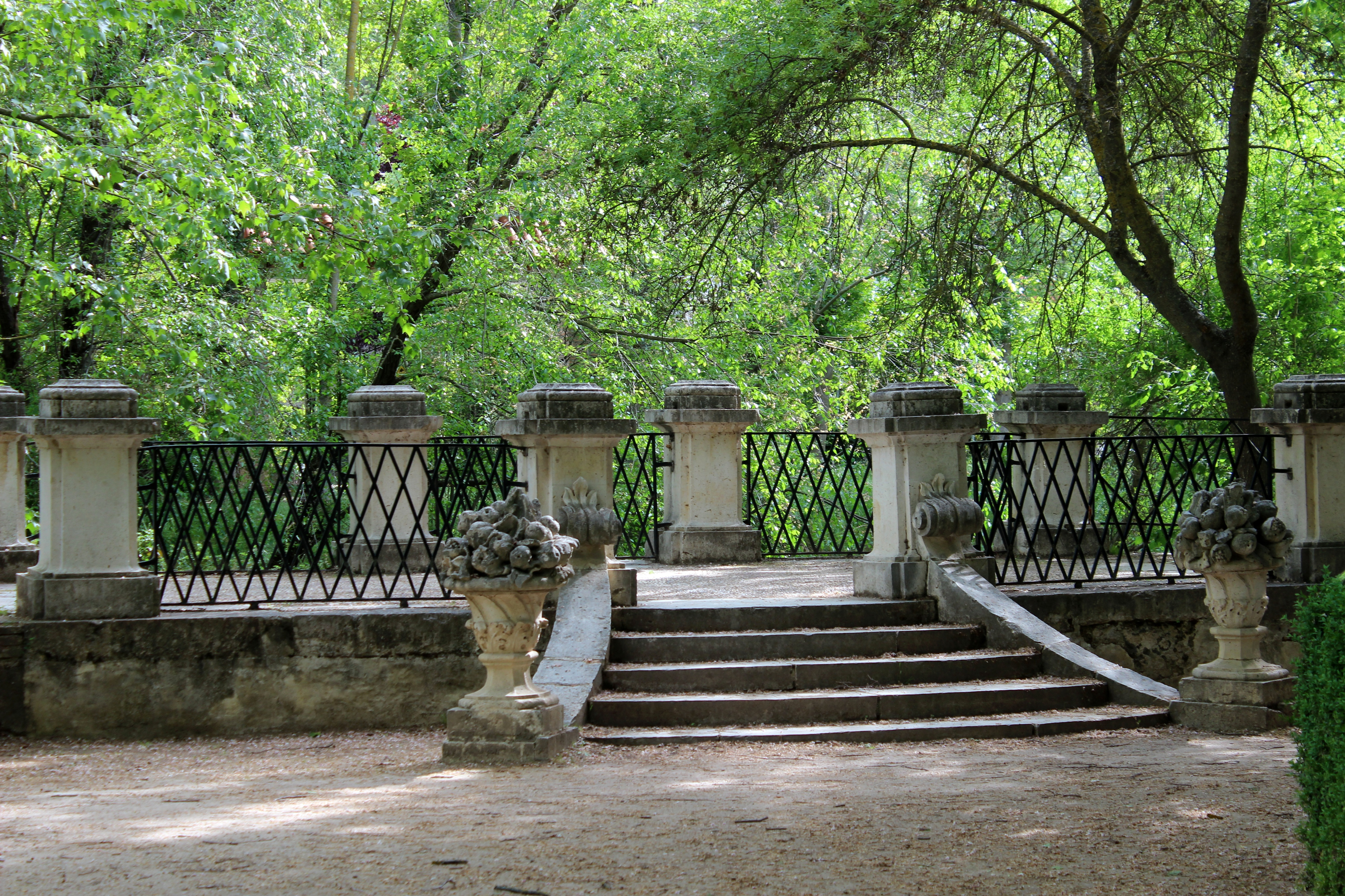 Aranjuez. Jardín de la Isla.